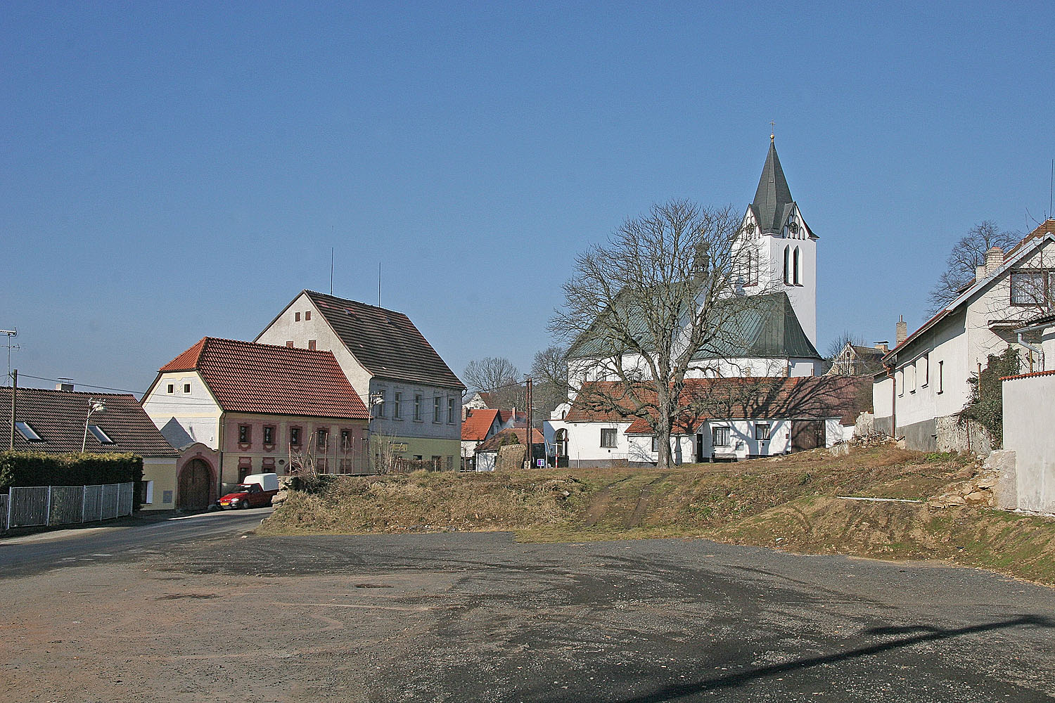 Kostel svatého Bartoloměje v Trhovém Štěpánově